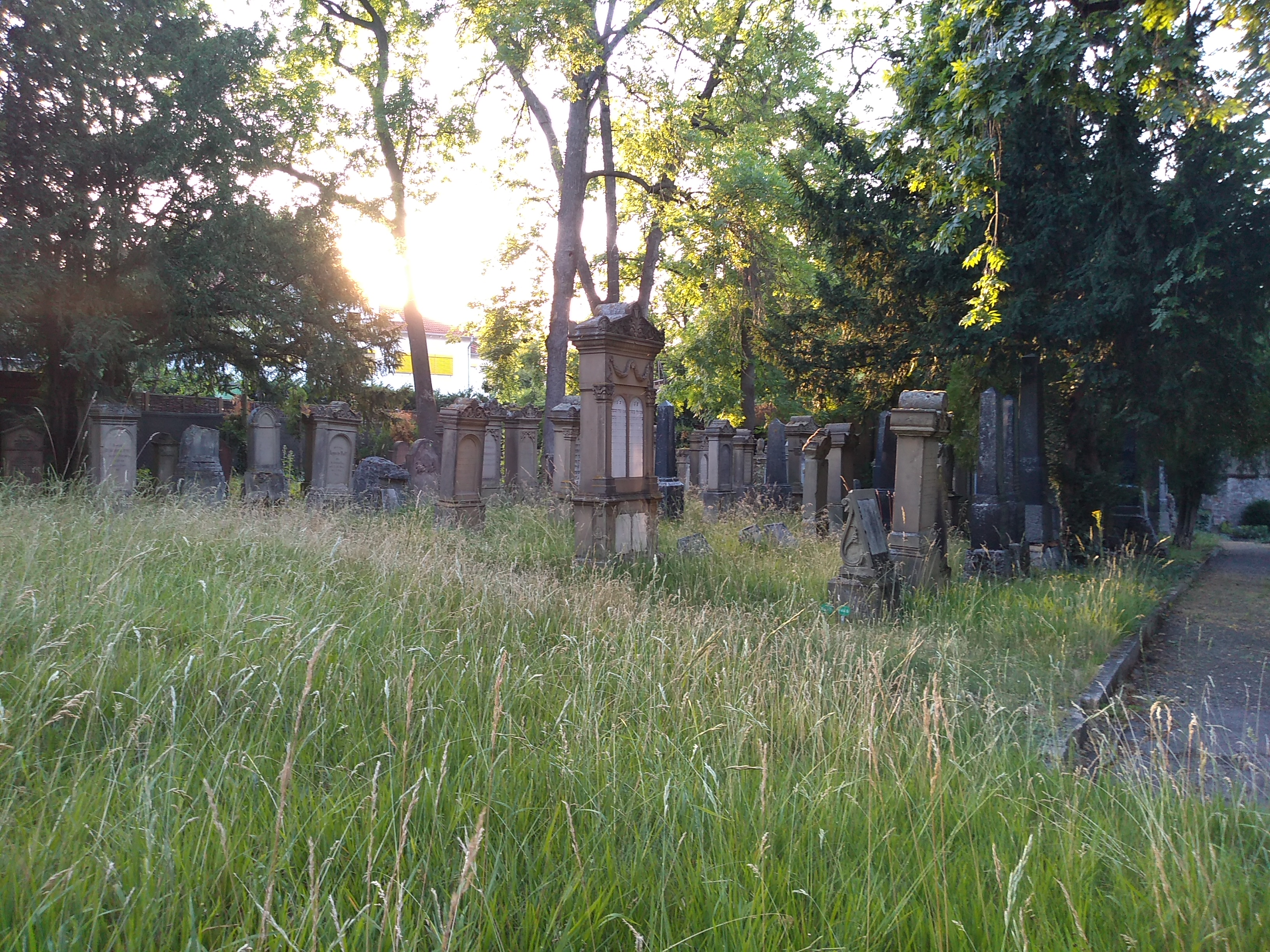 Denkmalzone „Neuer Jüdischer Friedhof“ auf dem städtischen Friedhof der Stadt Alzey, Landkreis Alzey-Worms, Rheinland-Pfalz, Deutschland. Kulturdenkmal gemäß Denkmalliste des Landes Rheinland-Pfalz (Stand: 31. Juli 2018). 1905 angelegtes Rechteckareal am christlichen Friedhof; etwa 160 Grabsteine, einige nach 1945.